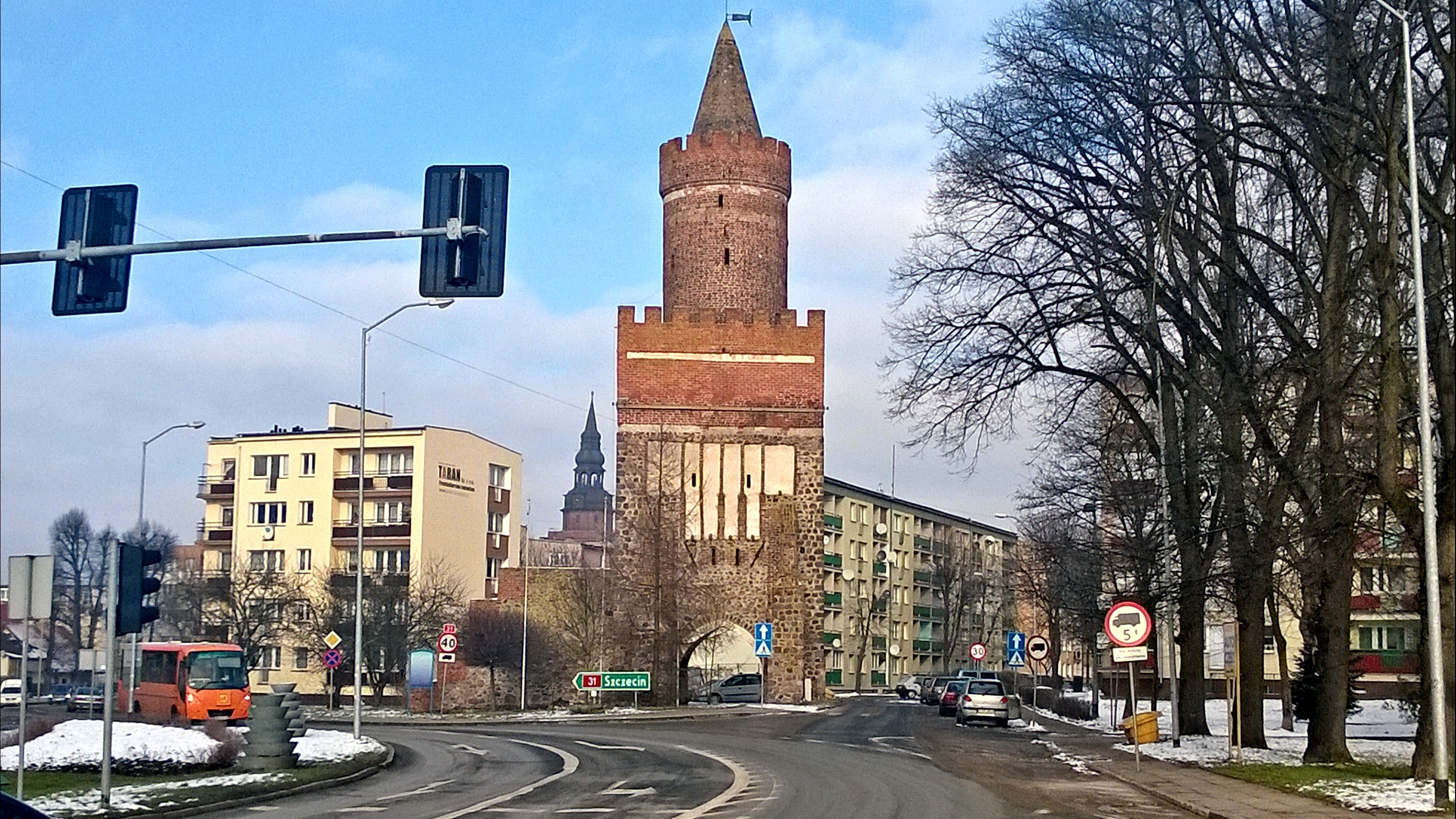 Gryfino